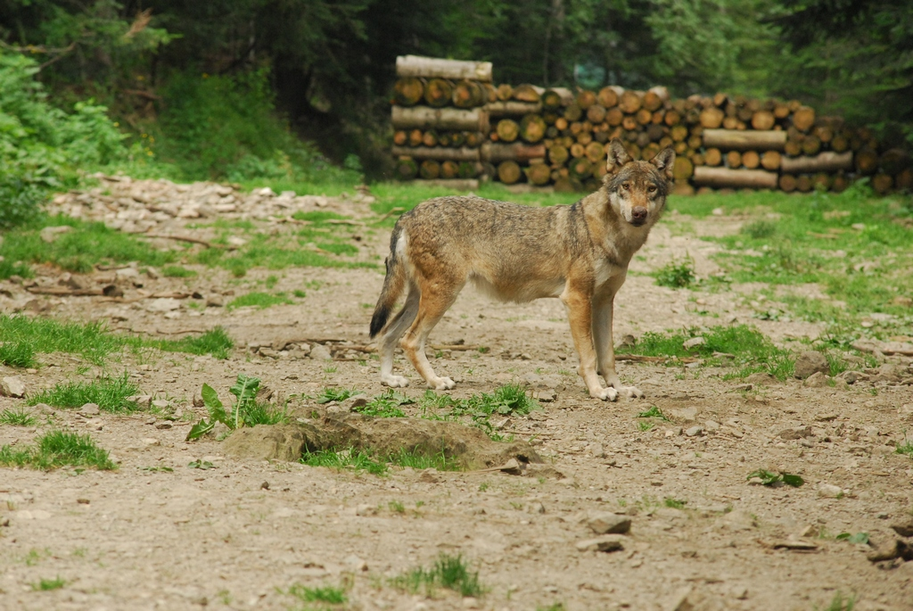 BOREON (06): ALPHA " Le temps du loup"